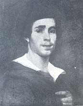 Auto retrato de José Rodrigues (1828-1887) vestido com capa e gorro.